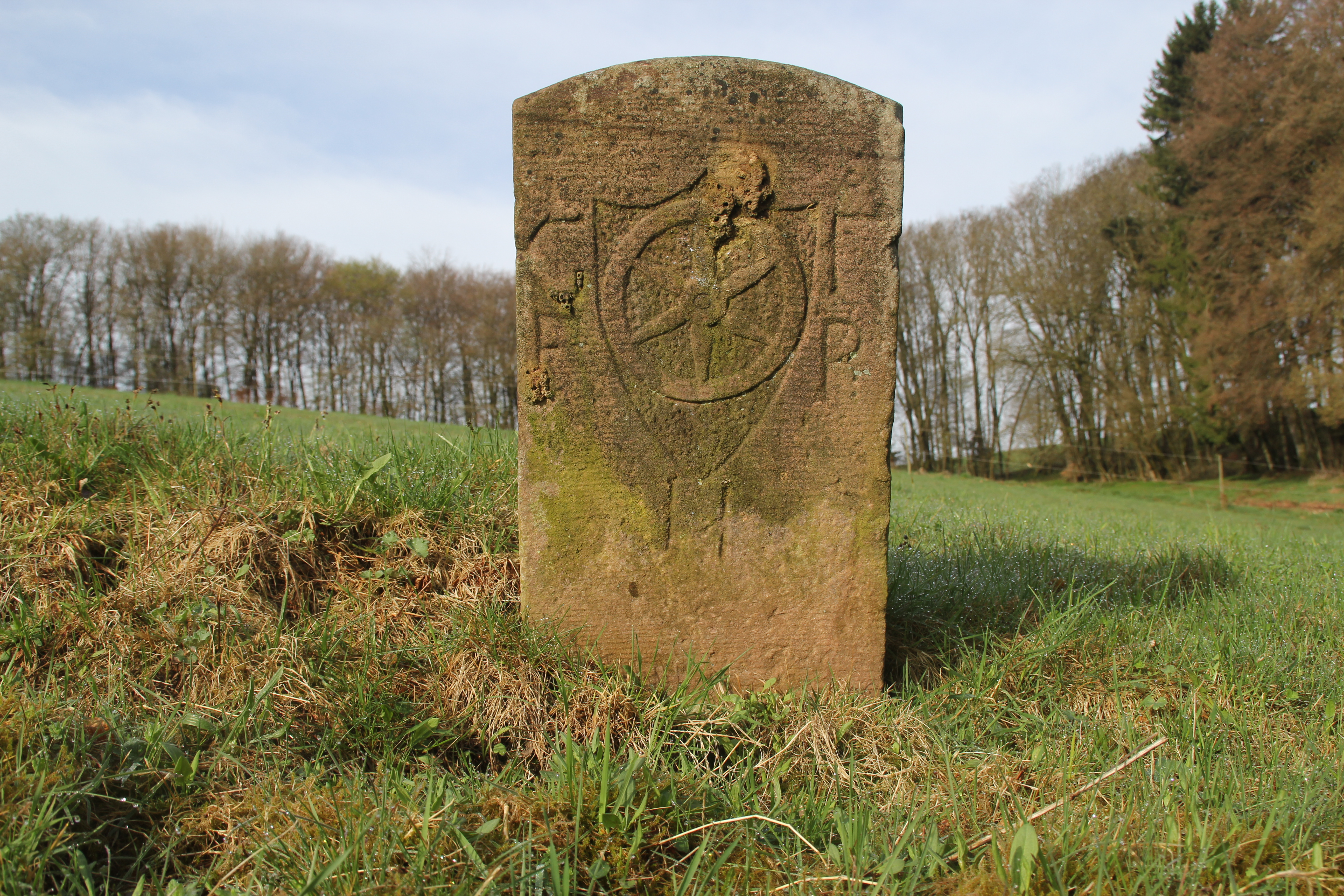 Grenzstein zwischen Geiselbach und Huckelheim